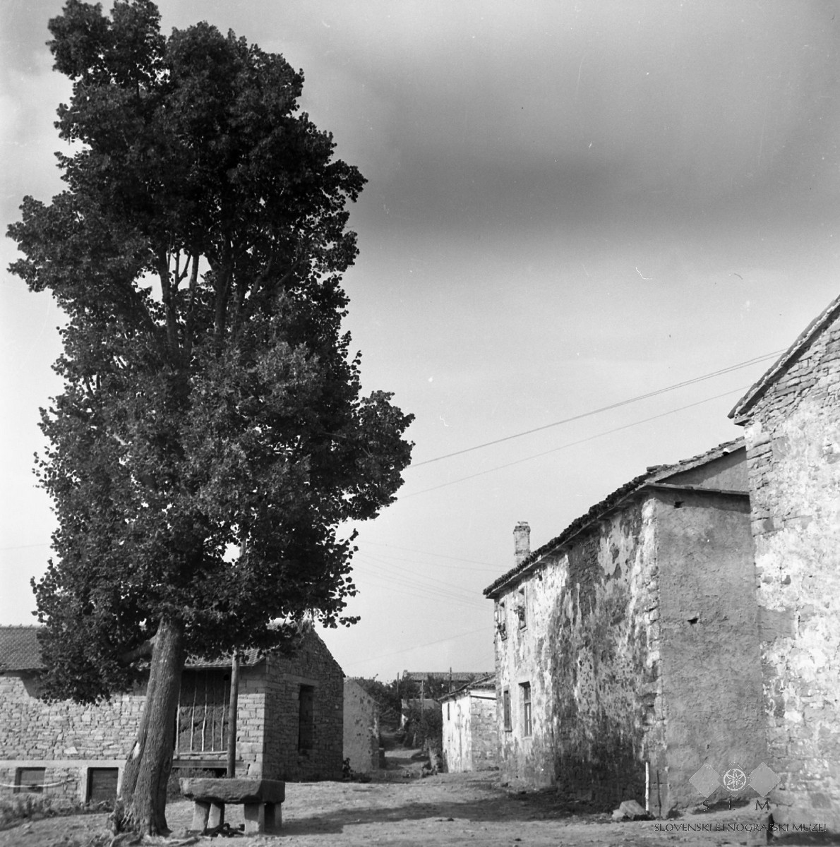 Lipa in kamnita miza sredi vasi, Tatre.